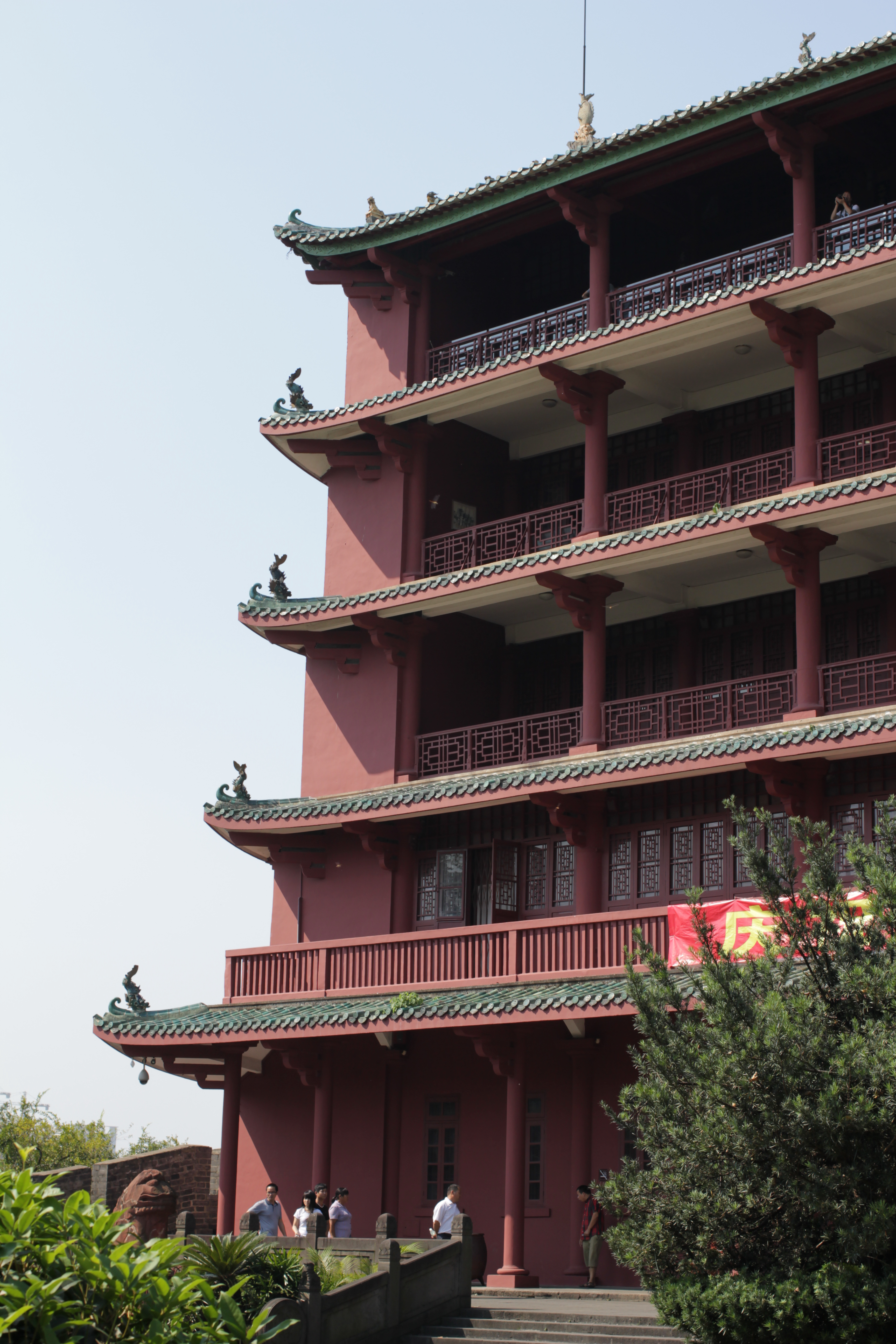 越秀公園鎮海樓